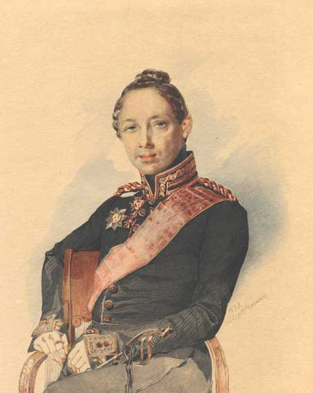 Портрет М.О. Луніна: Акварель